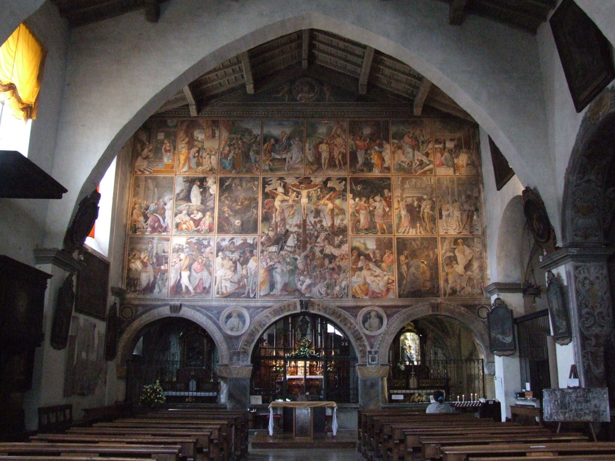 Church of Santa Maria delle Grazie, Varallo Sesia, Italy - Frescos by Gaudenzio Ferrari (16c)